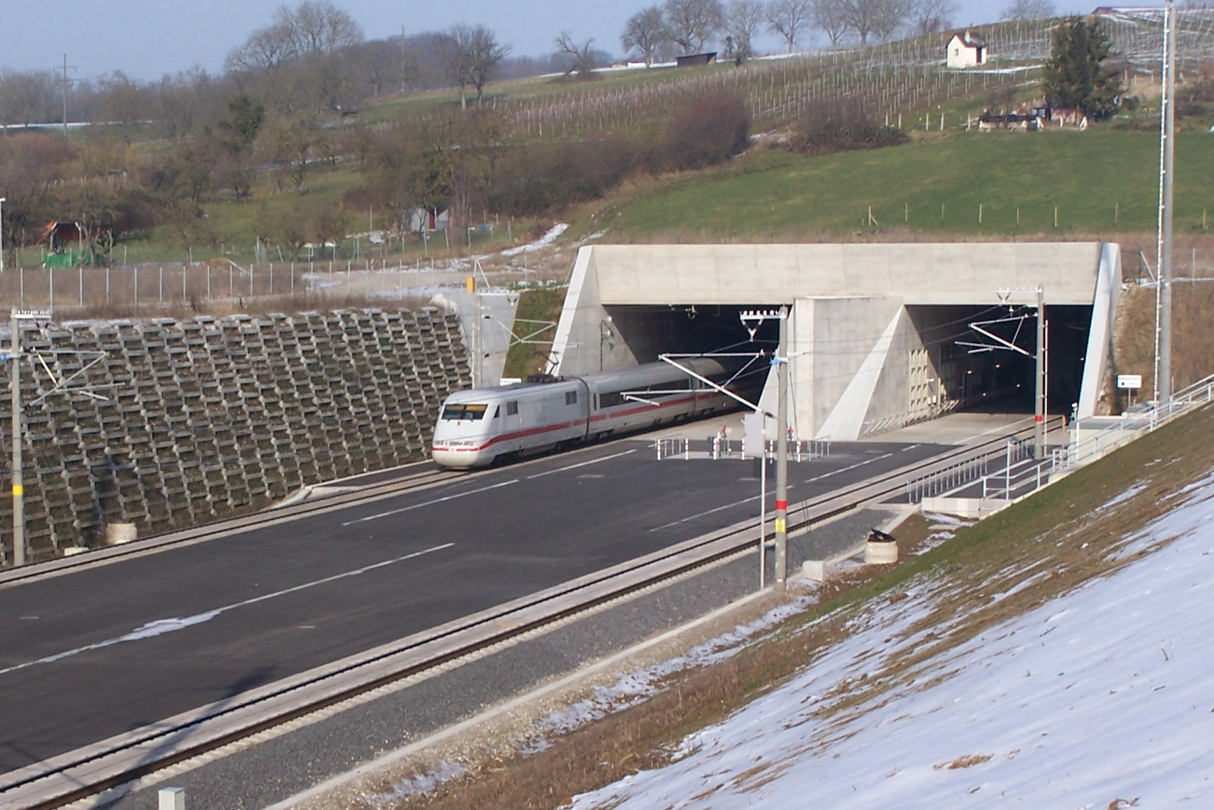 ICE 1 am Südportal des Katzenbergtunnels. Er befindet sich auf der Fahrt nach Basel.